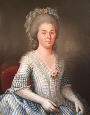 AJClemen